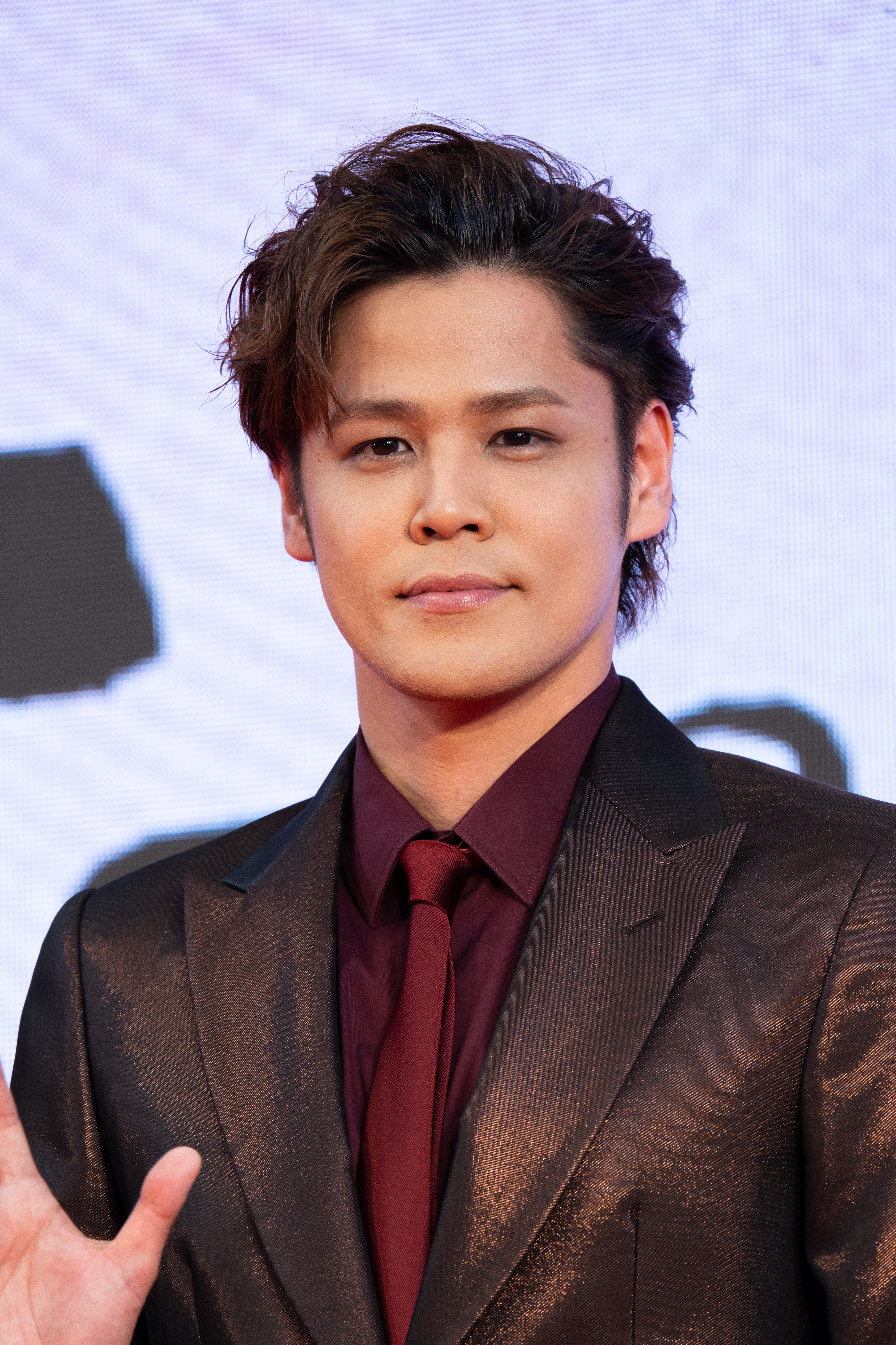 第32回 東京国際映画祭 オープニングセレモニー 宮野真守 (HUMAN LOST 人間失格)